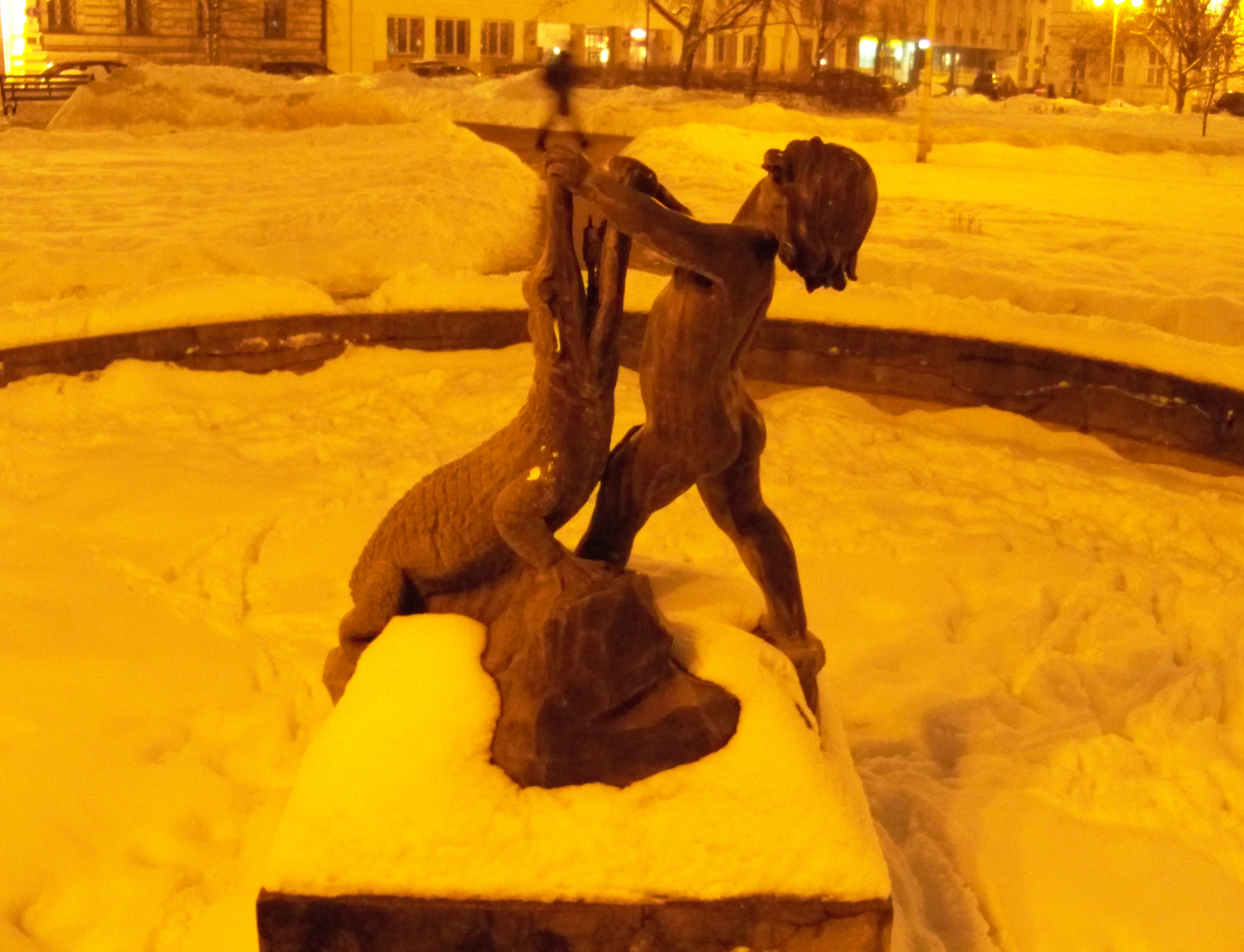 Chłopiec z krokodylem. Rzeźba Stanisława Jackowskiego. Plac J. Dąbrowskiego w Warszawie.